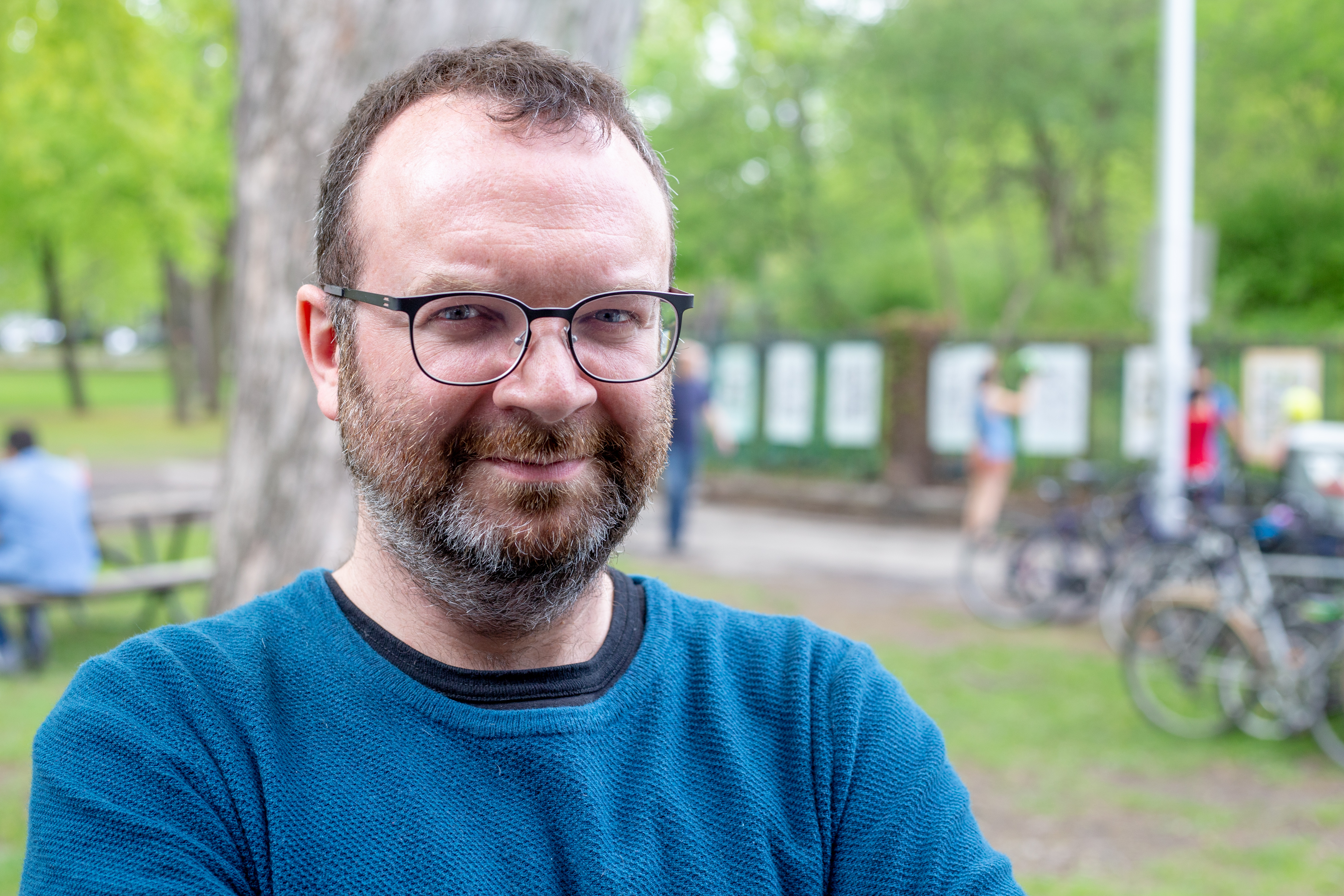 L'éditeur et auteur de bandes dessinées Jimmy Beaulieu au Festival BD de Montréal (FBDM)